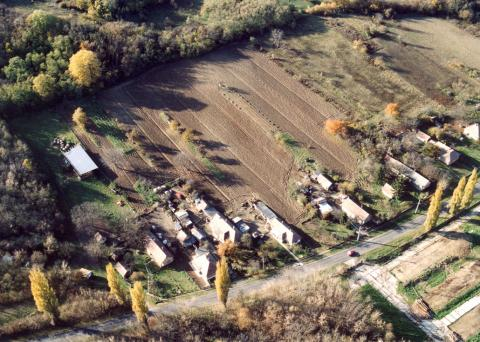 Pusztaszemes, Hungary, aerialphotography